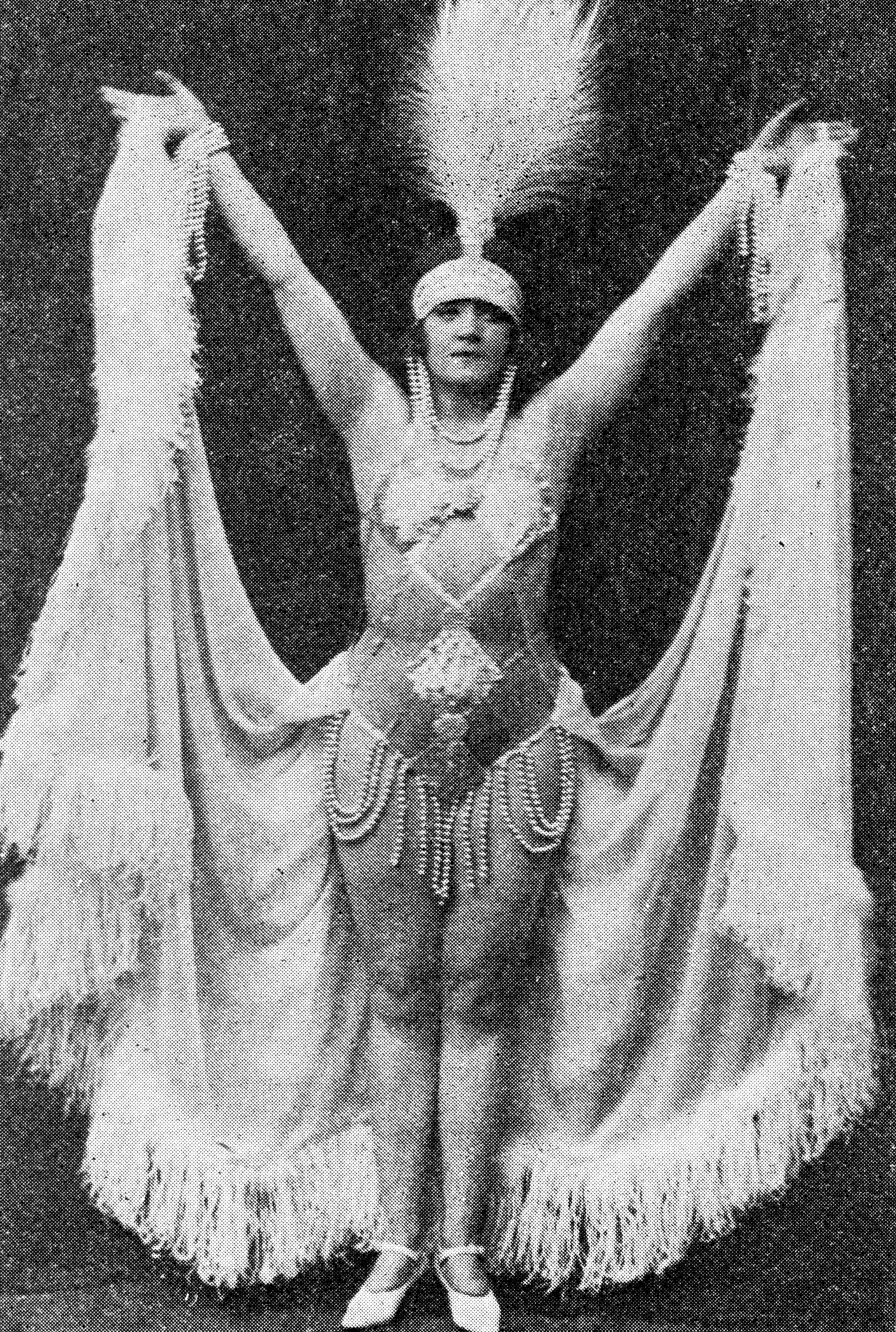 Kazimiera Niewiarowska w Najpiękniejszej z kobiet, 1924